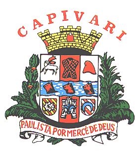 Brasão do município de Capivari, São Paulo, Brasil